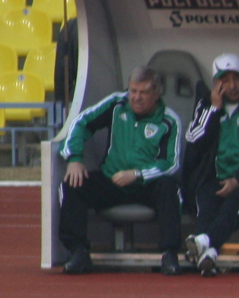 Anatoly Baidachniy